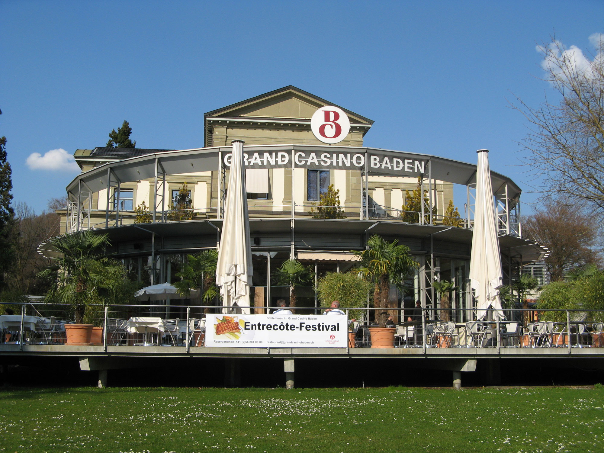 Stirnfront des Kursaals (Grand Casino) in Baden